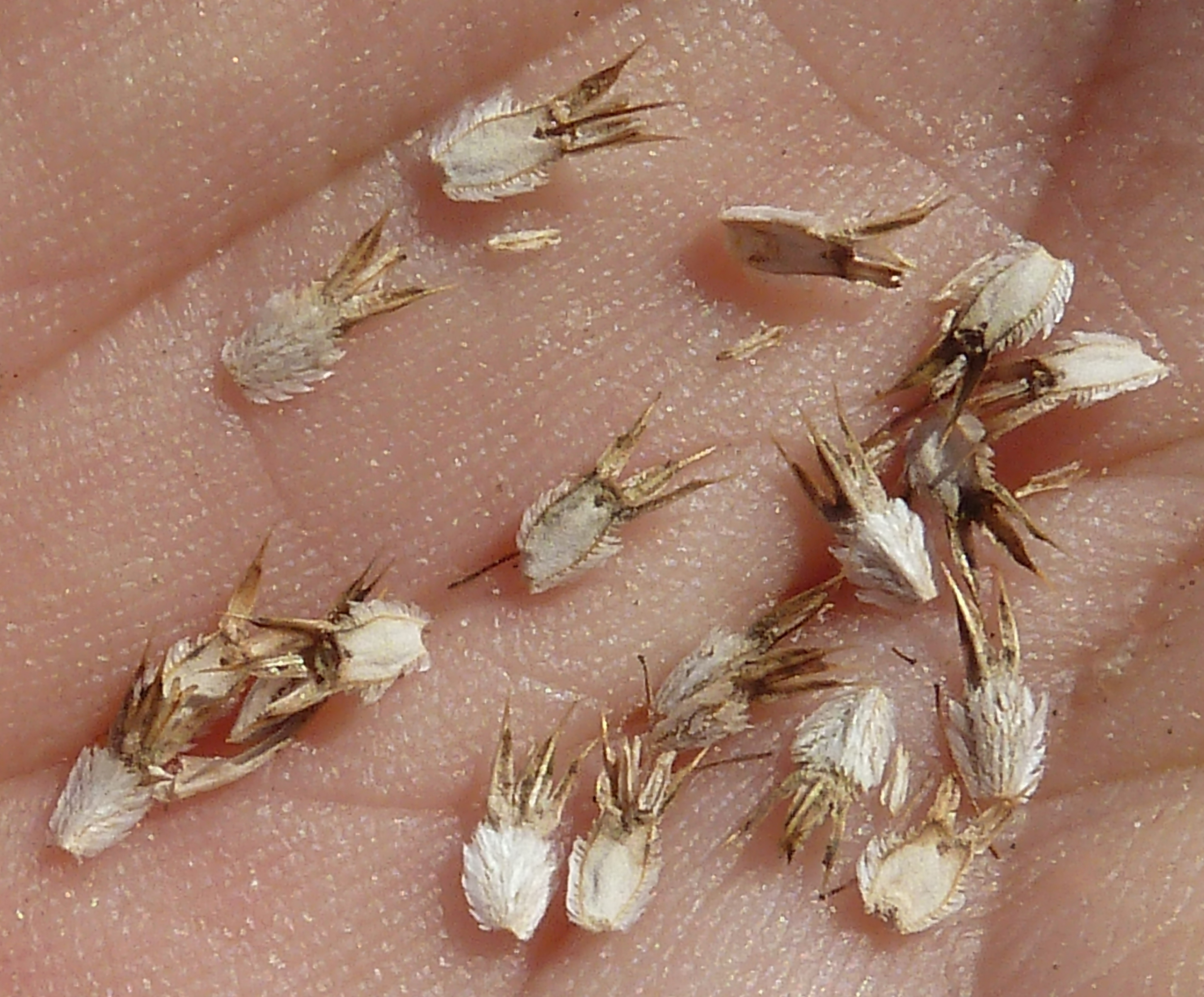 Eryngium campestre: frutos (esquizocarpo de 2 mericarpos) - Camino del Canalillo, Albatera, (Alicante, España)